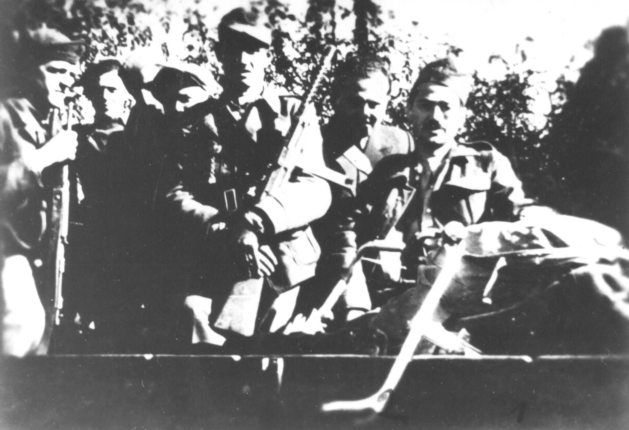 Srpskohrvatski / српскохрватски: Venko Markovski, makedonski pesnik i Hadži Lješi, komandant albanskih partizana, u okolini Debra, septembra 1943.